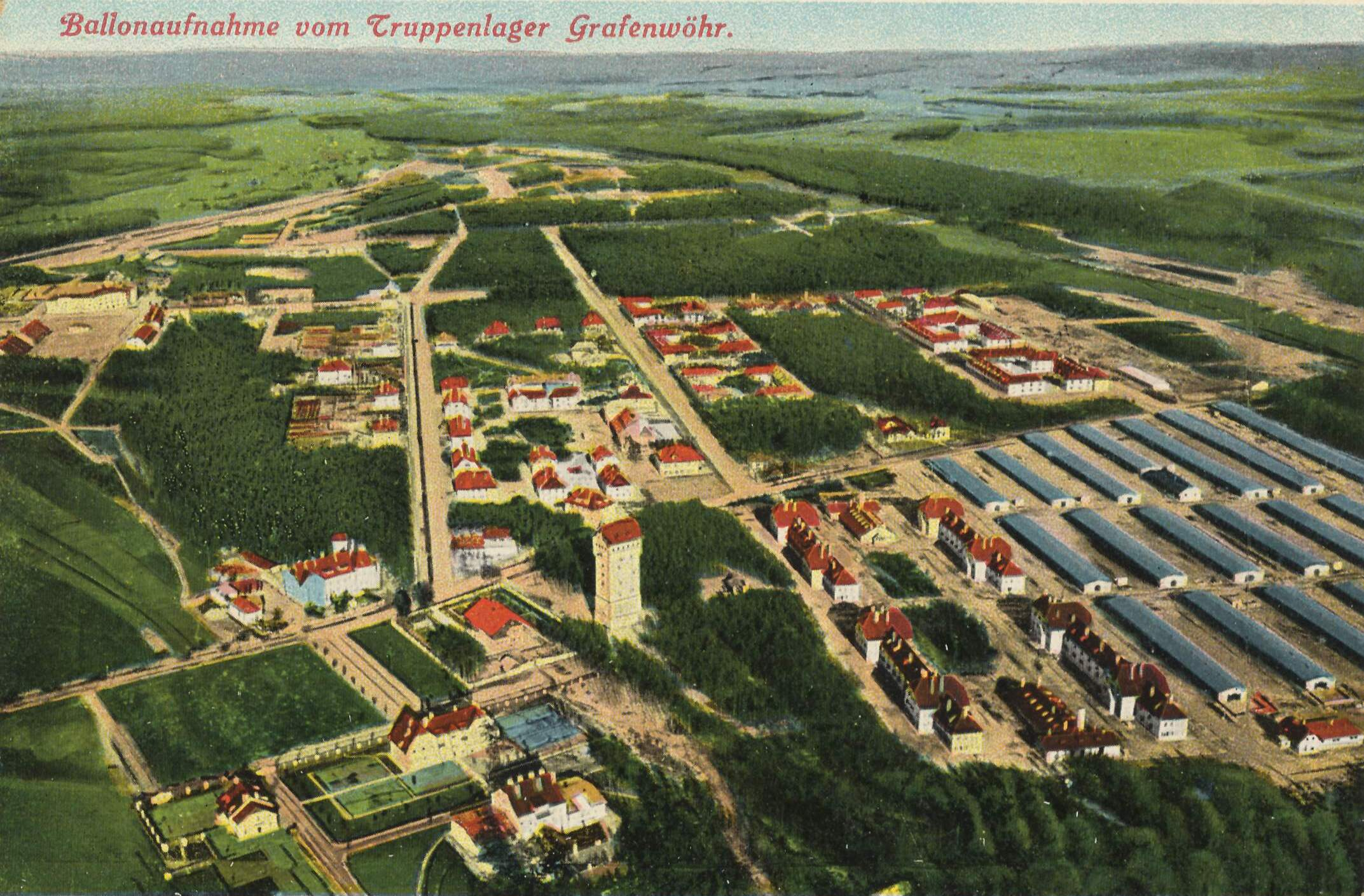 Kolorierte Bildseite der Ansichtskarte mit der fortlaufenden Nummer 1 aus dem Verlag von Hans Spahn in Grafenwöhr, mit einer Luftbildfotografie des Truppenübungsplatzes Grafenwöhr, hier als eine der auch noch zu Anfang des 20. Jahrhunderts sehr seltenen Ballonaufnahmen ...